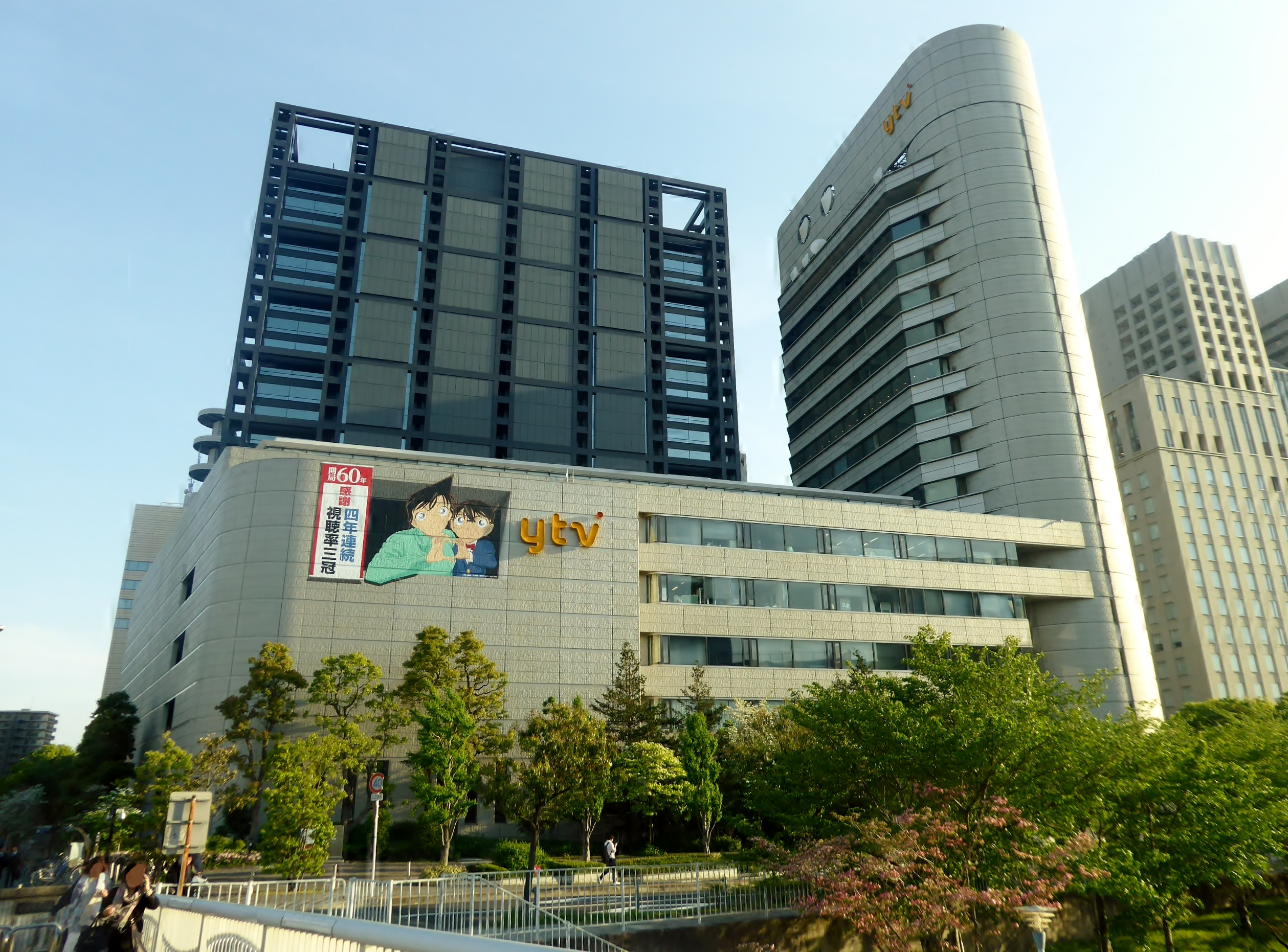 讀賣テレビ放送株式会社本社を撮影。